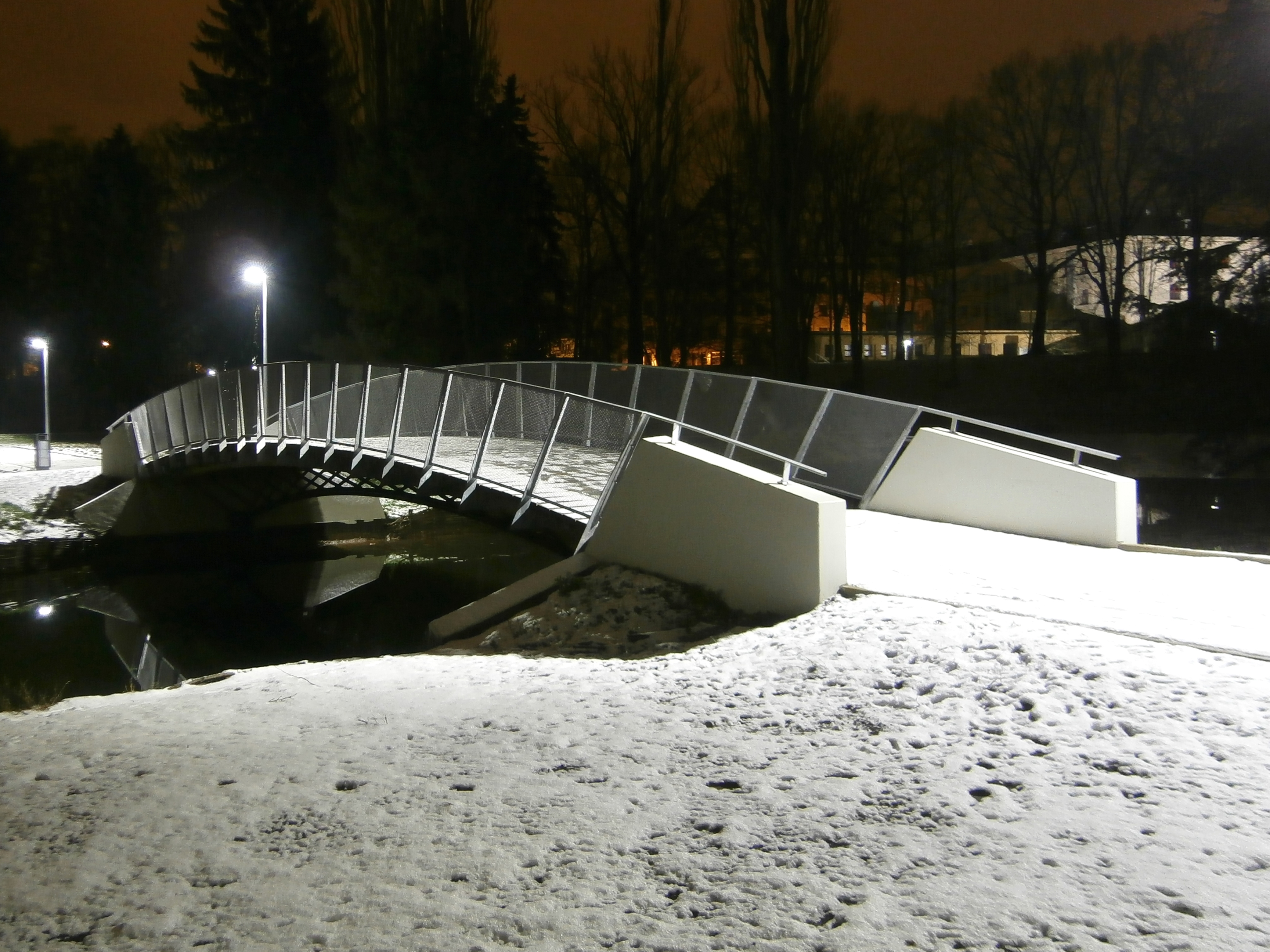 Šimkovy sady (Hradec Králové)